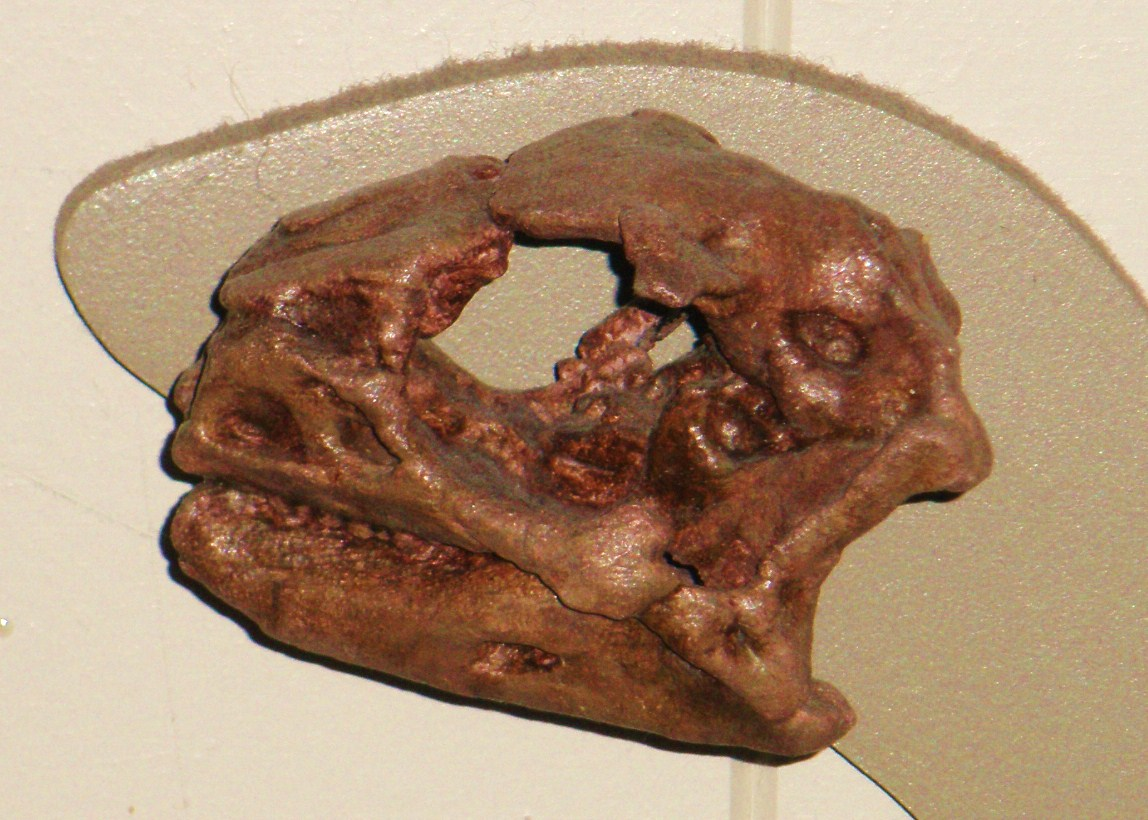 Fossil of Lesothosaurus, an ornithischian dinosaur Took the photo at Musee d'Histoire Naturelle, Brussels